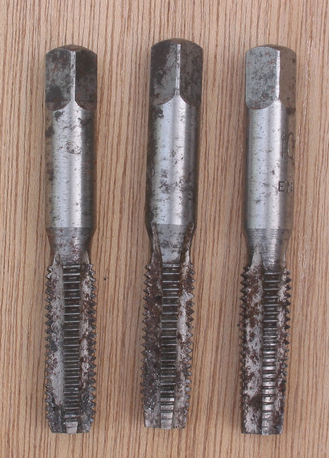 Tap set 10 mm SI